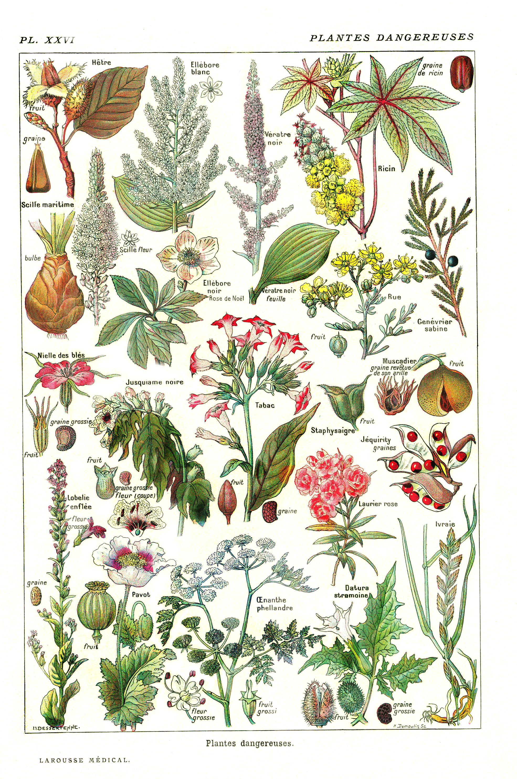 Plantas Perigosas, p. 927, Larousse Medical Illustré, Paris, 1912 Galtier-Boissière (org.)